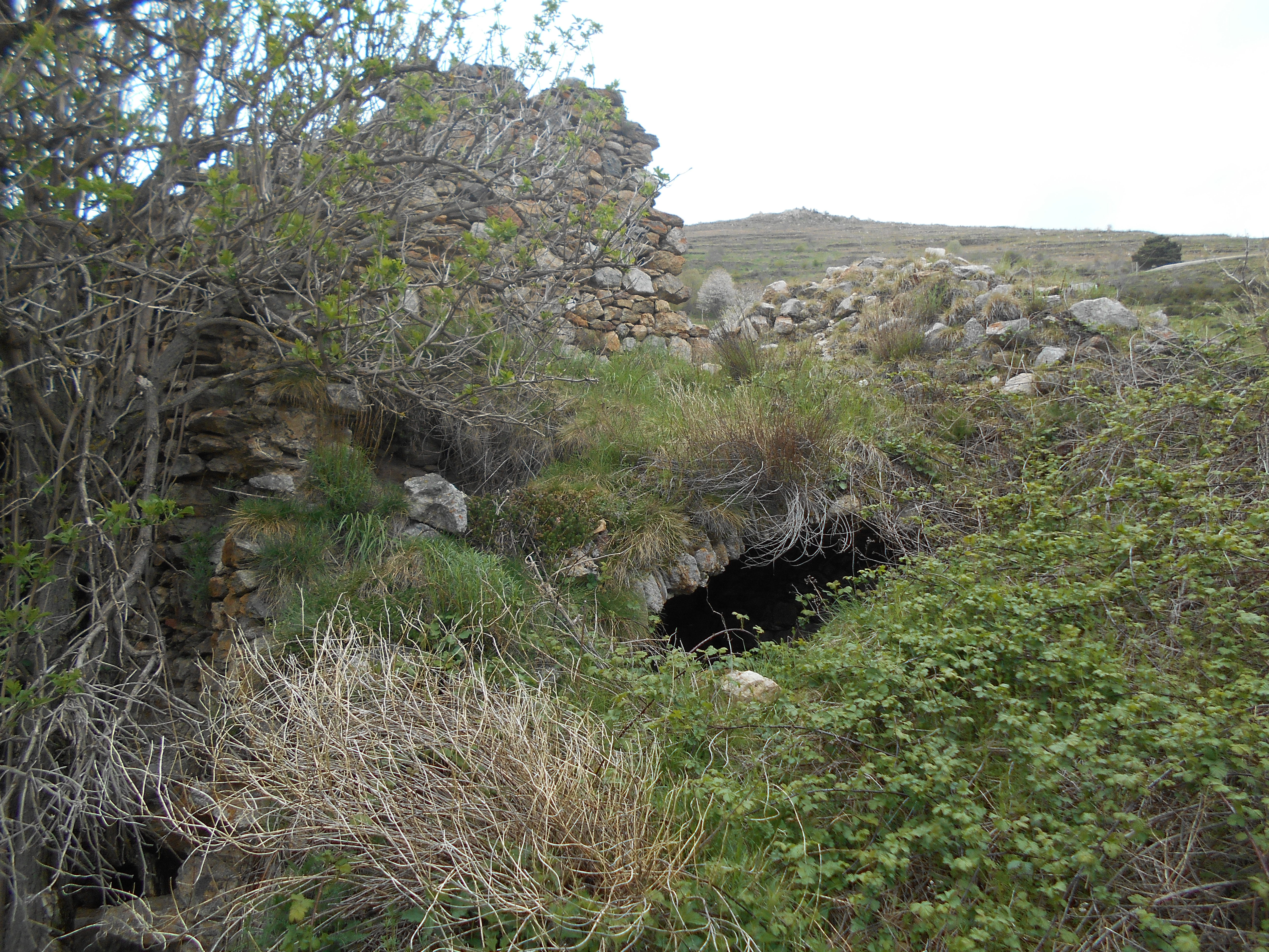 Santa Maria de Clariana, o de Jau, a Mosset